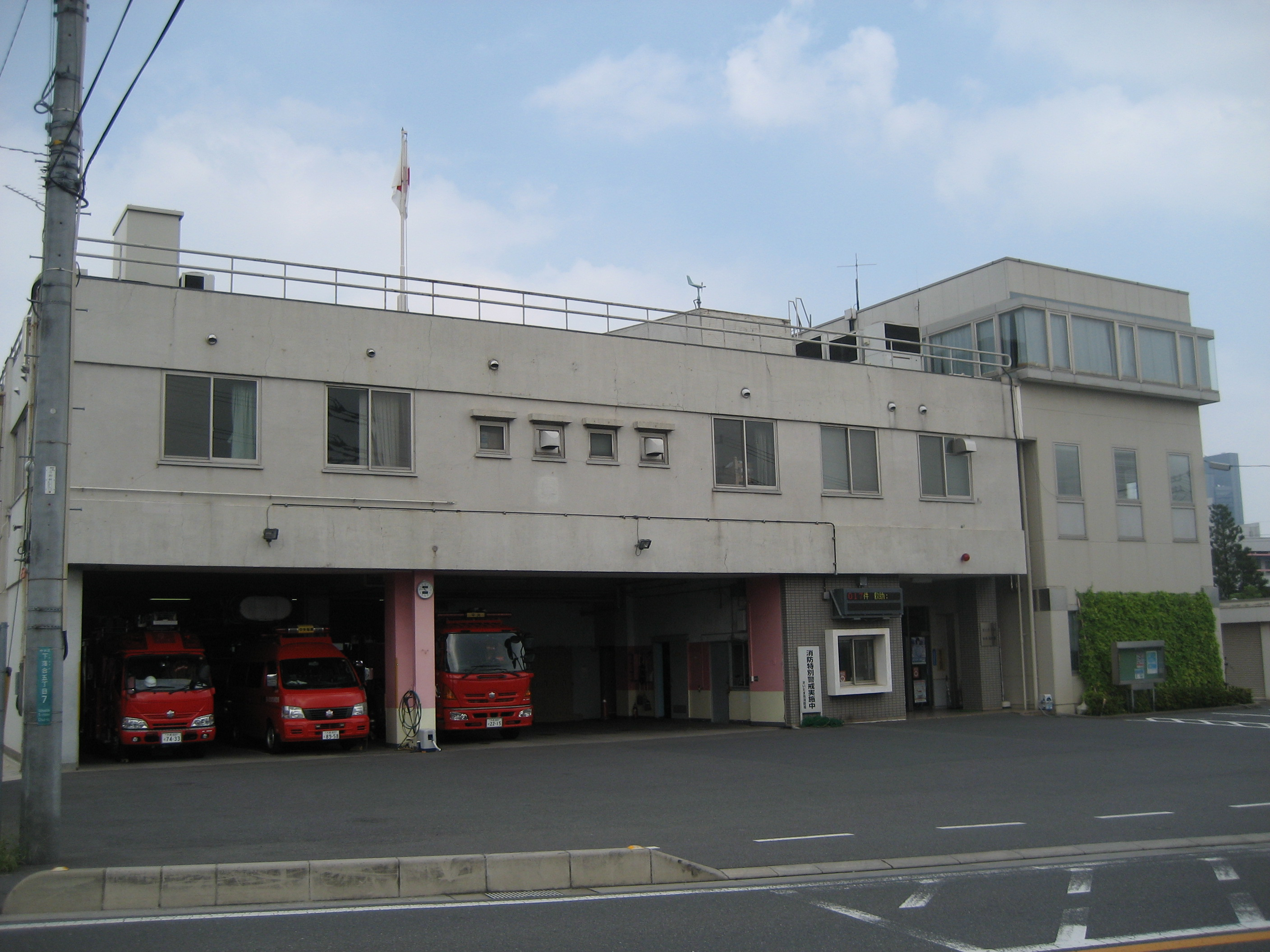 さいたま市消防局中央消防署庁舎